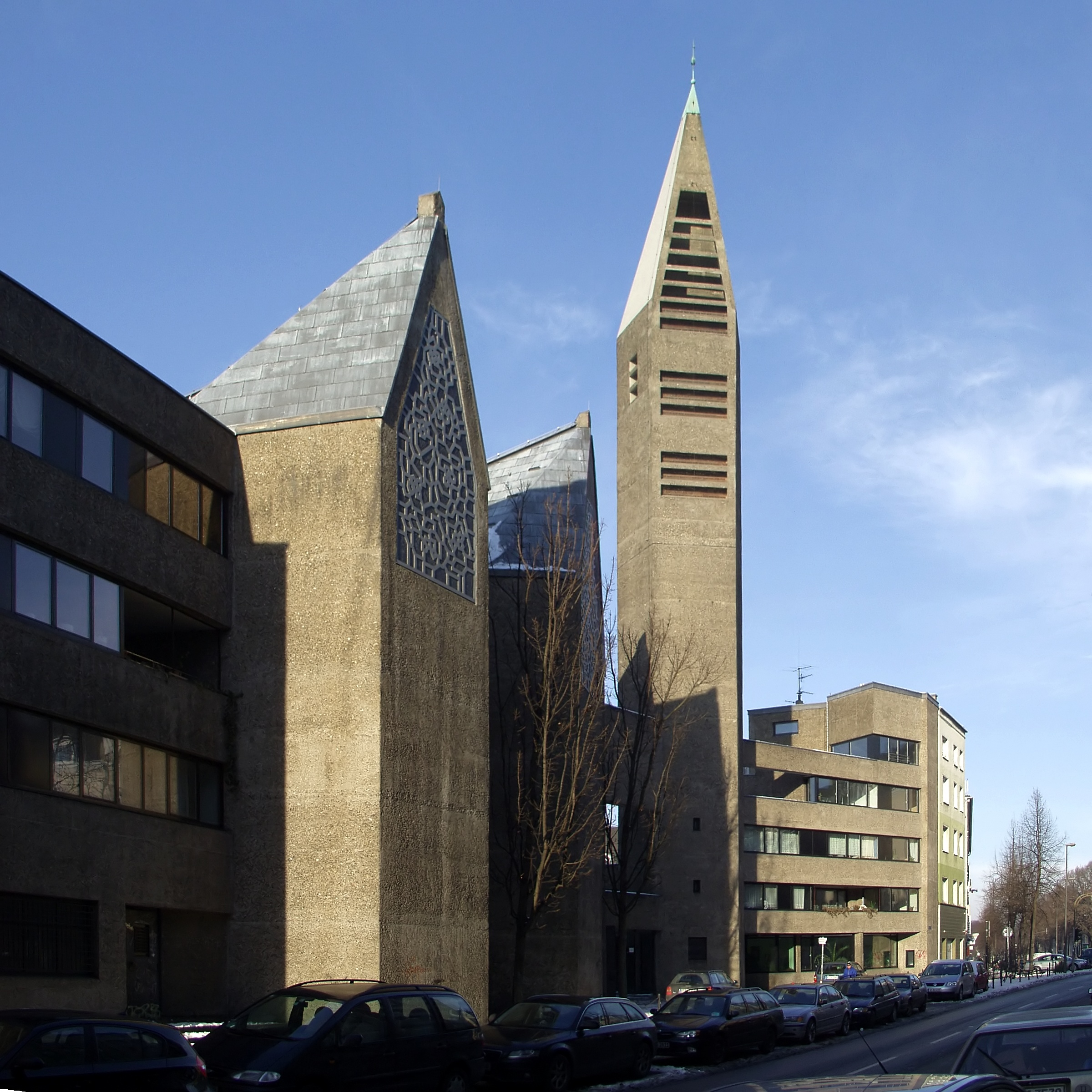 St. Gertrud Köln, Ostseite